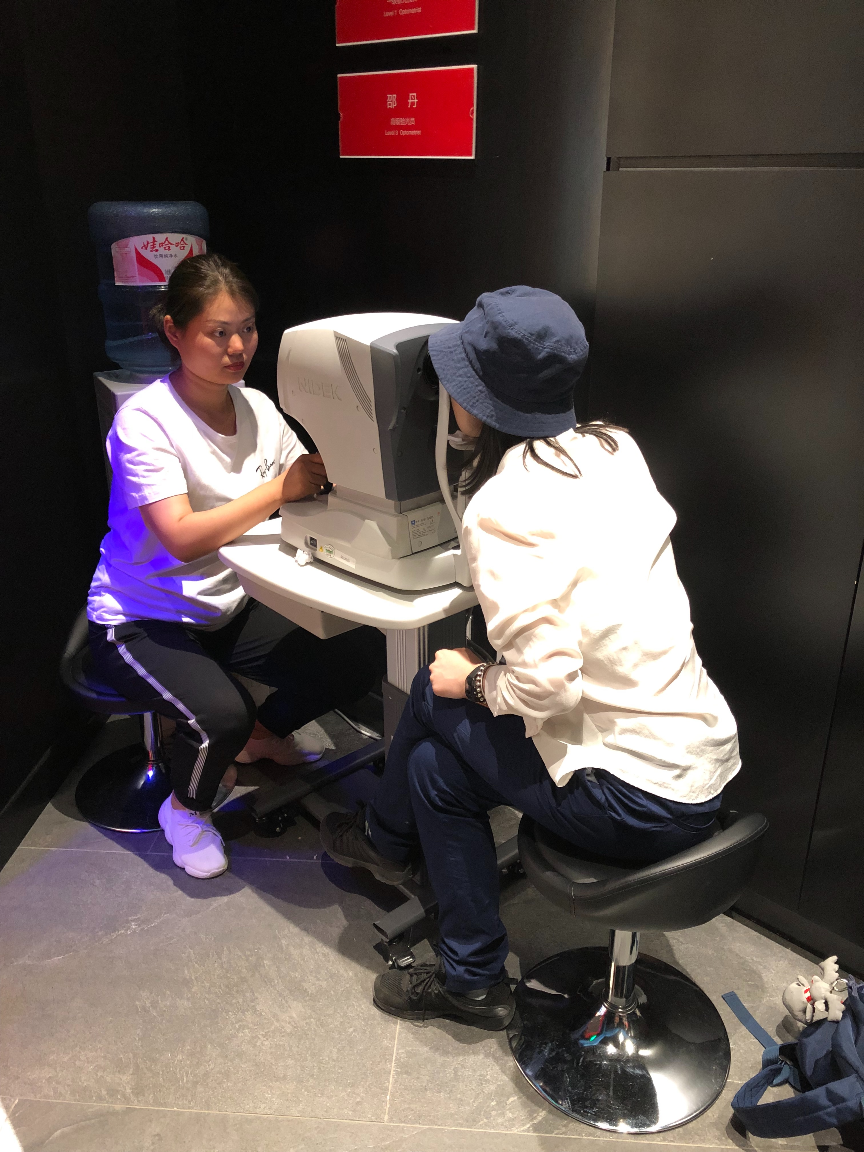 沈阳市, 中国, June 2019